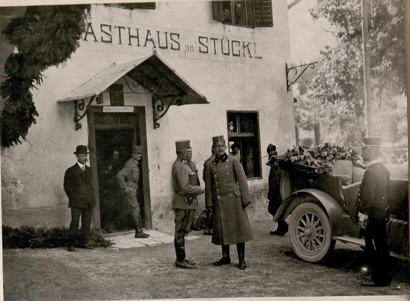 Sr.Majestät im Gespräch mit Sr.Exzllz.Armee Komdt G.O.v.Krobatin (4/6.1917.)